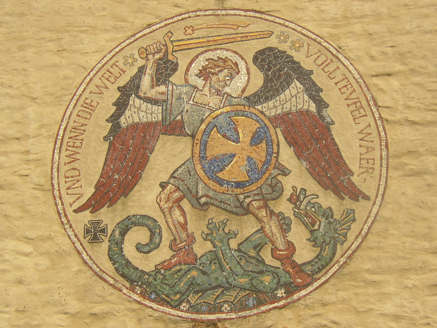 Steinhagen - Kirchmosaik